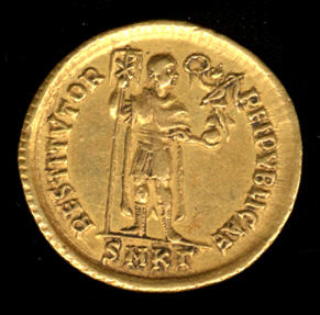 Byzantine; Solidus; Coins